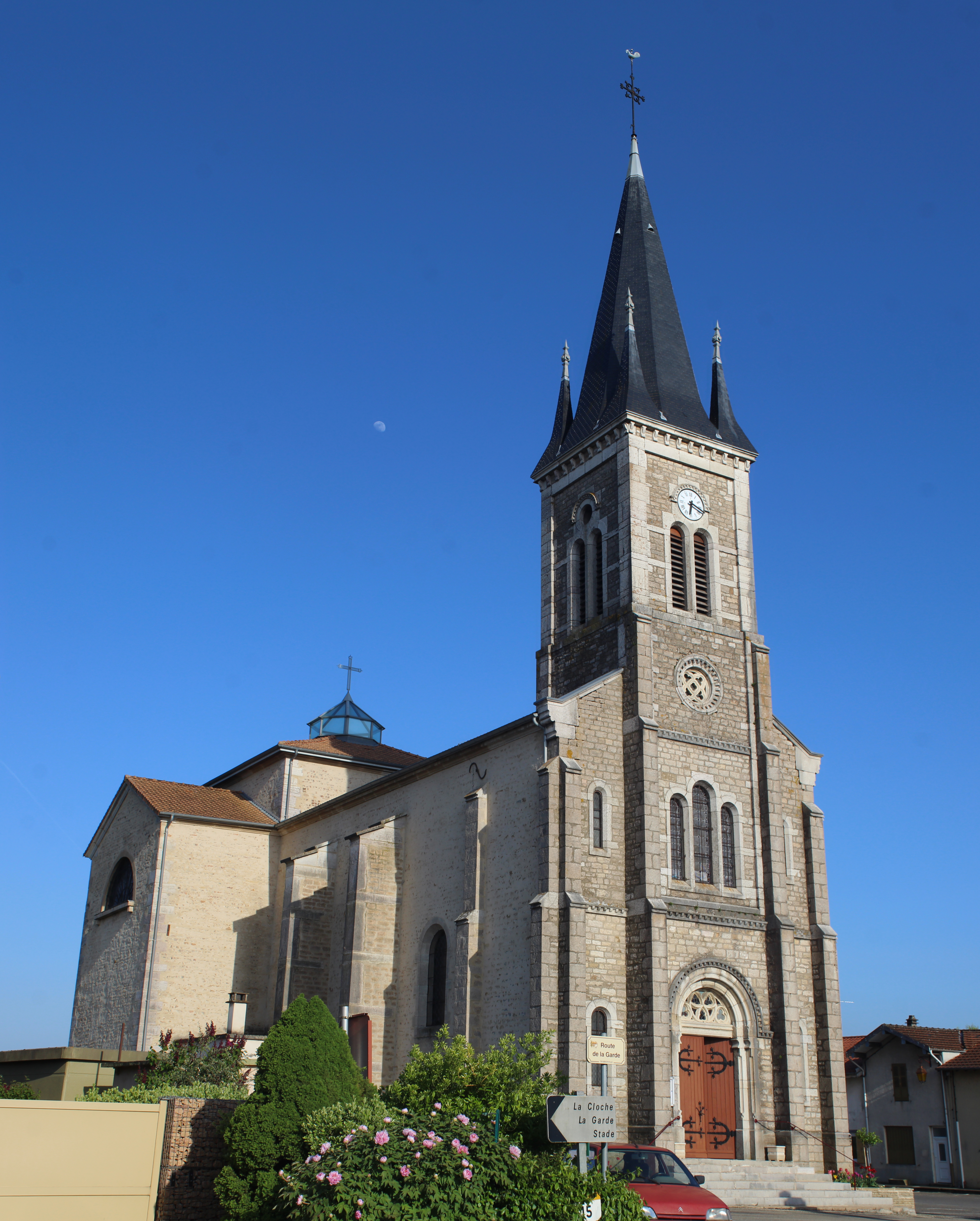 Église Saint-Pierre-et-Saint-Paul de Marsonnas.